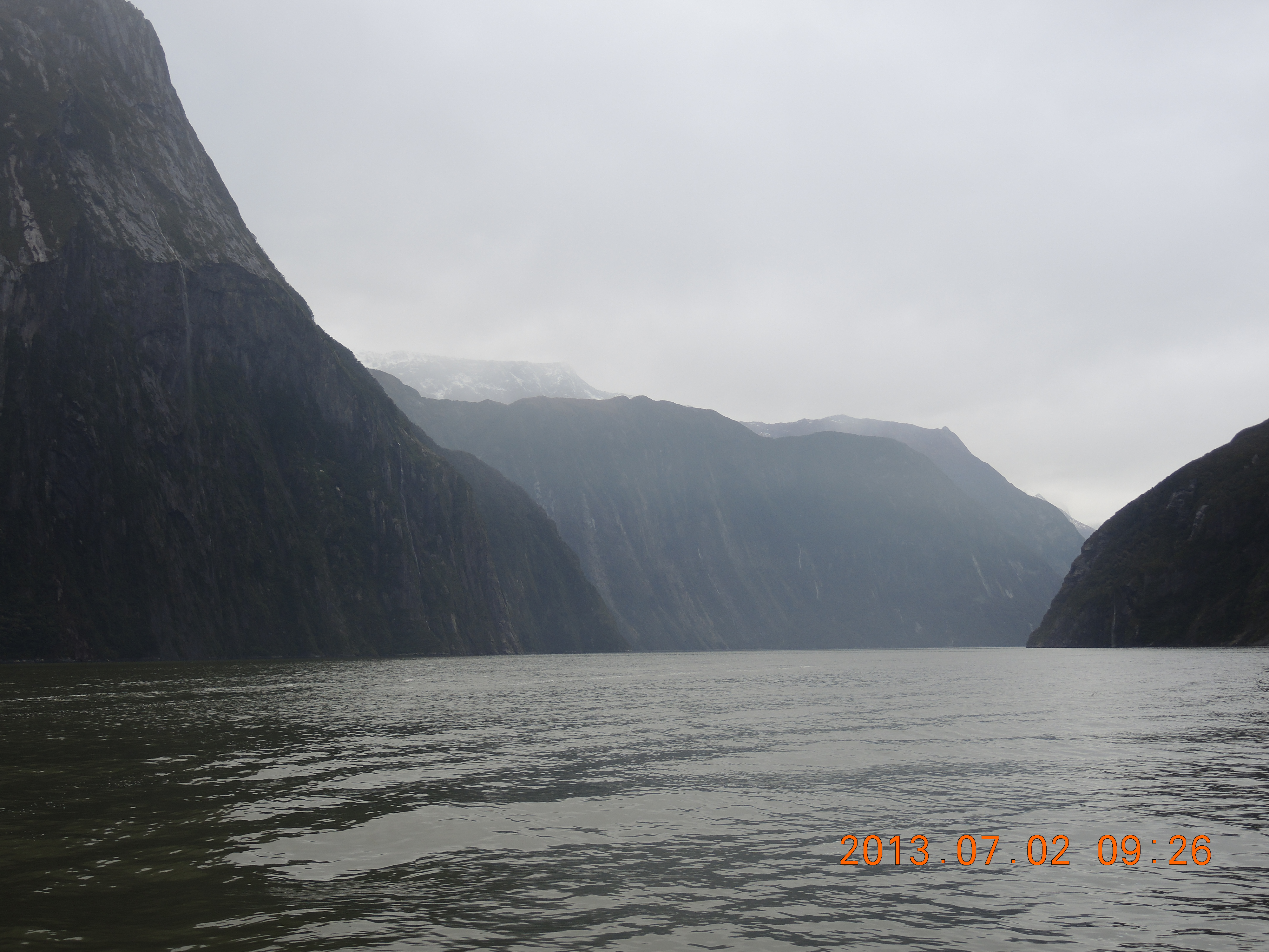 米爾福德峽灣